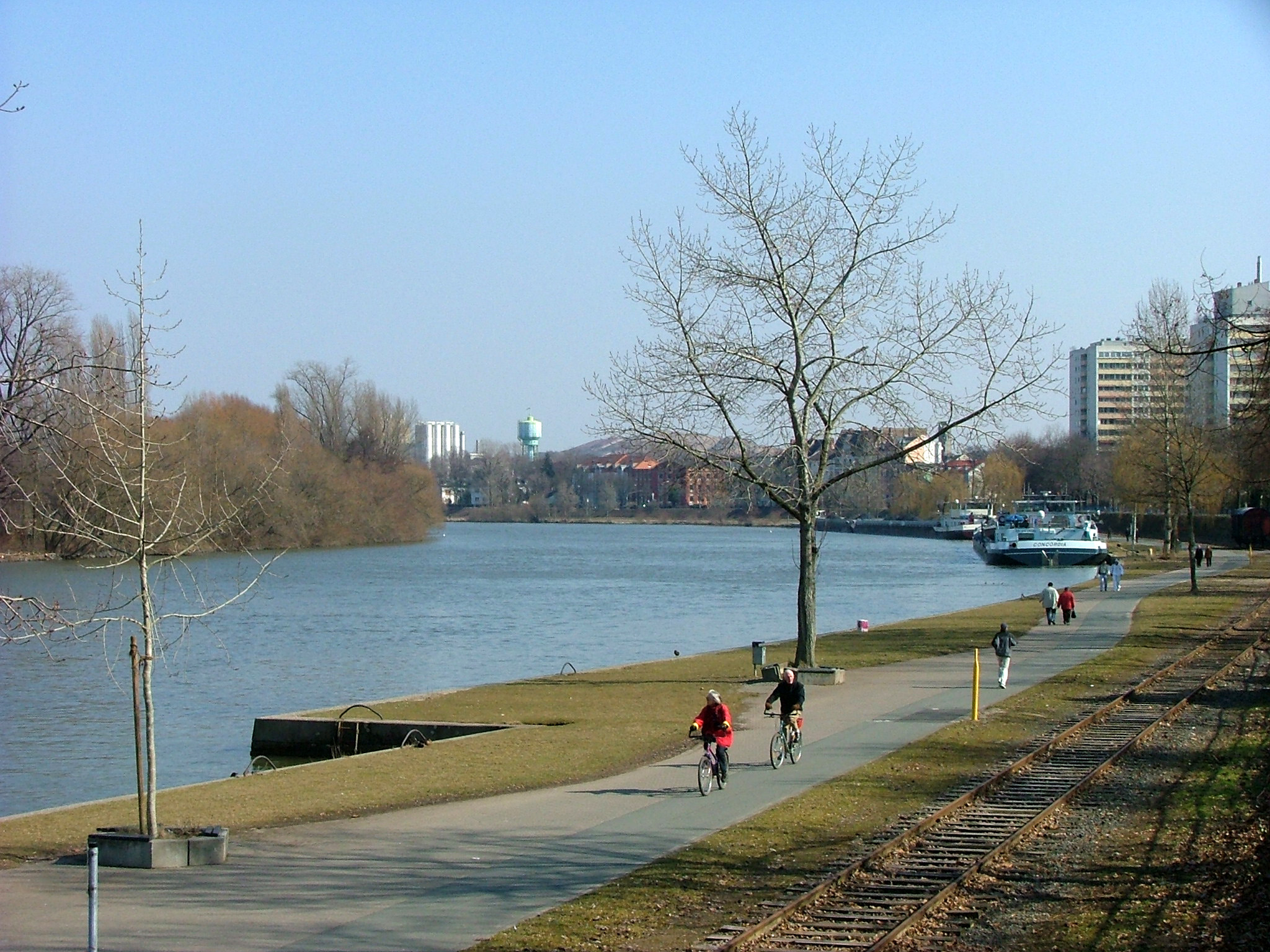 Mainverlauf bei Offenbach am Main